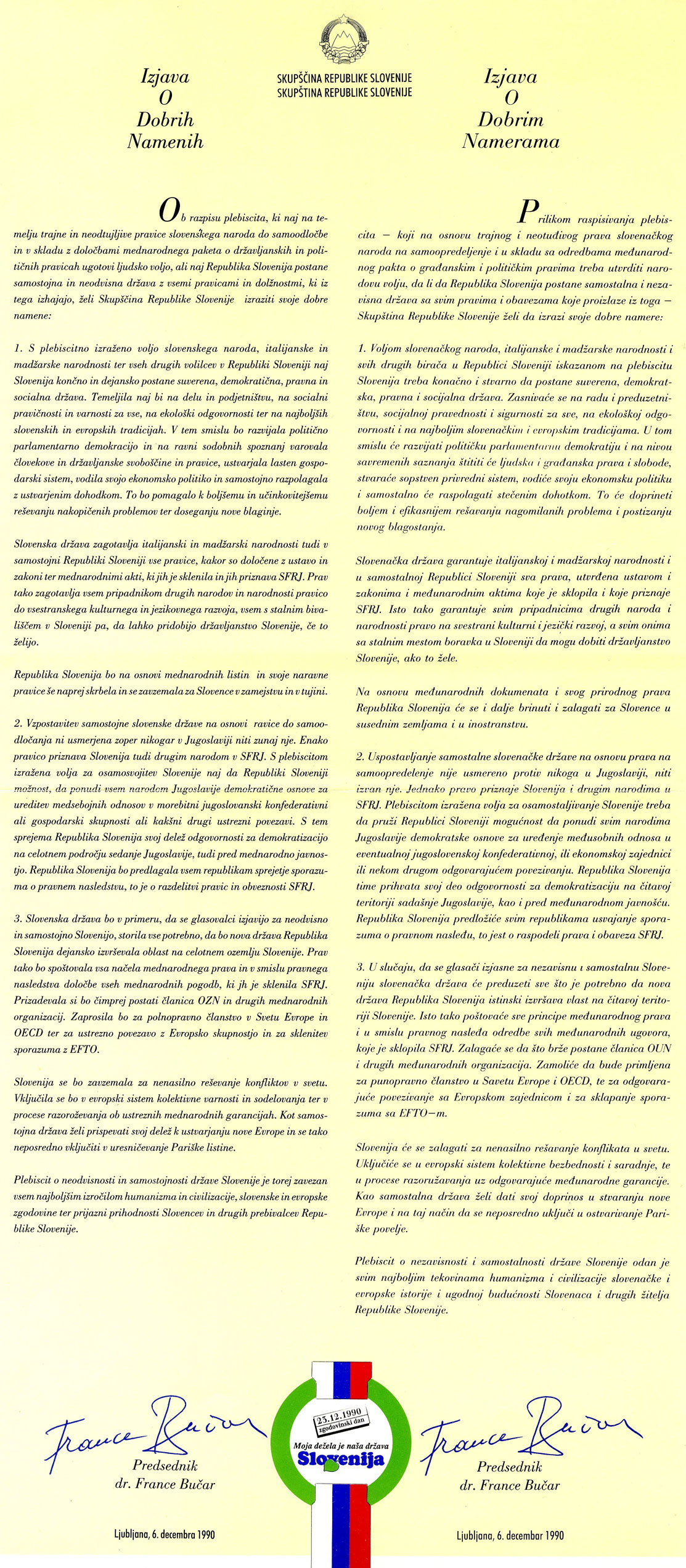 Izjava o dobrih namenih Skupščine Republike Slovenje